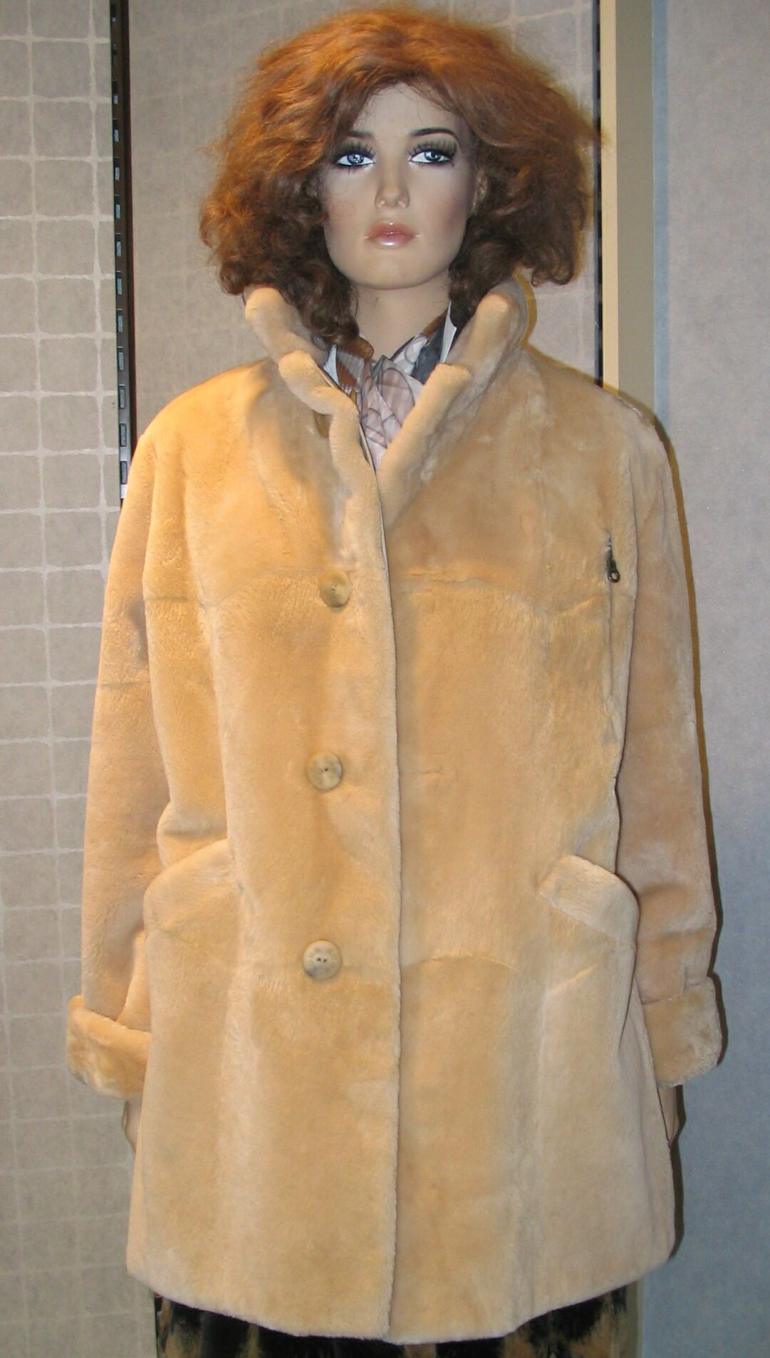 Nutria jacket reversible/ Wendbare Samt-Nutriajacke (Südamerikanische Nutria, gerupft, geschoren und gefärbt)